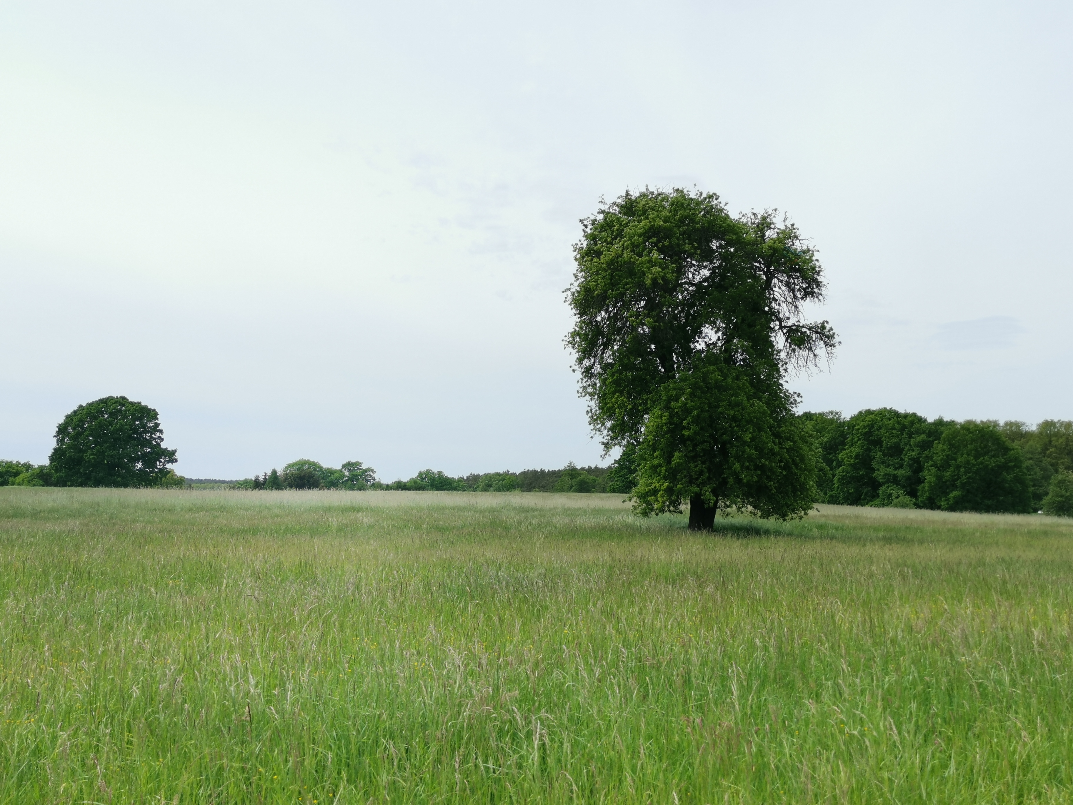 Naturdenkmal Birne in Weskow an der L47